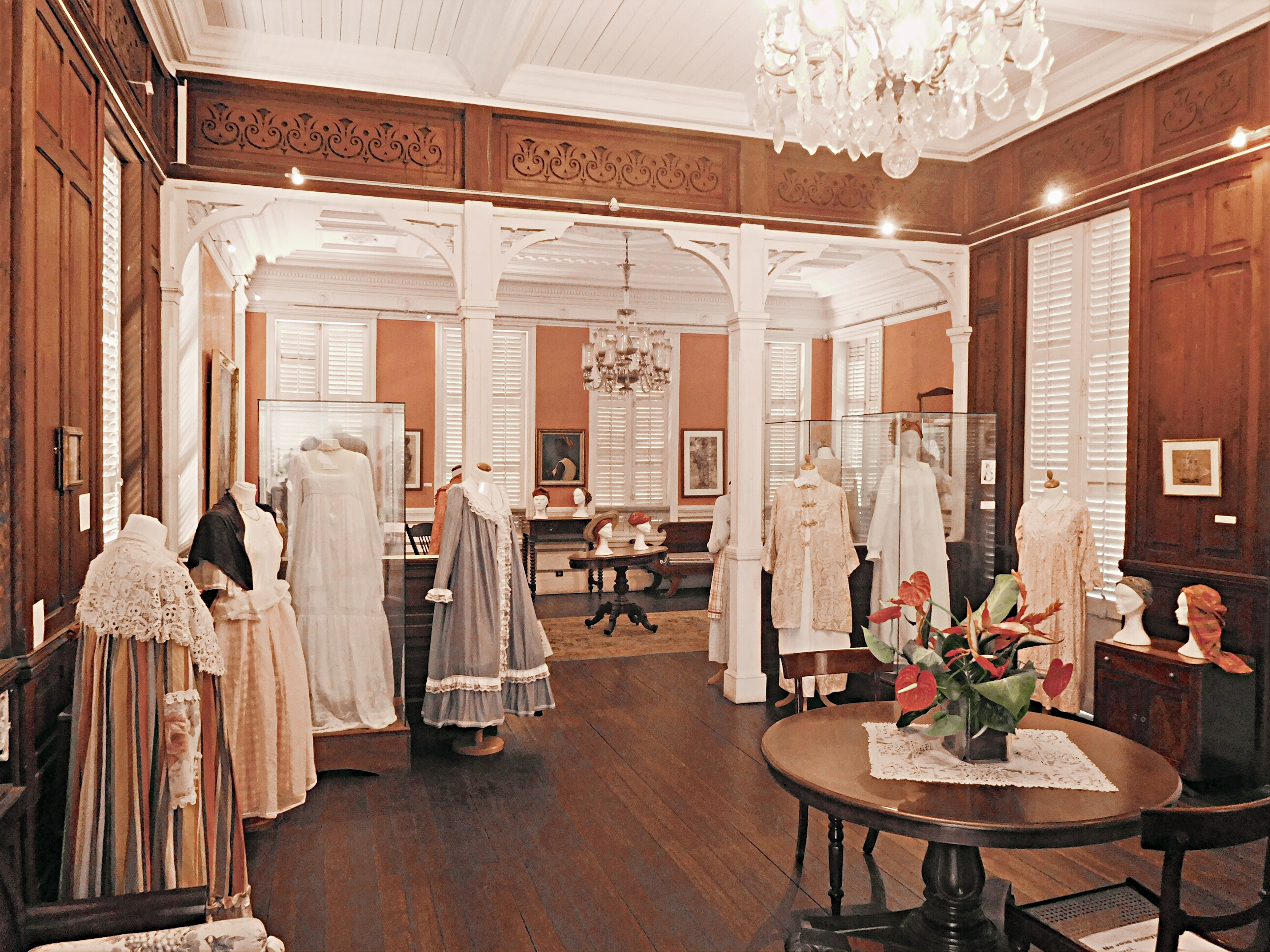 Intérieur du Musée Saint John Perse